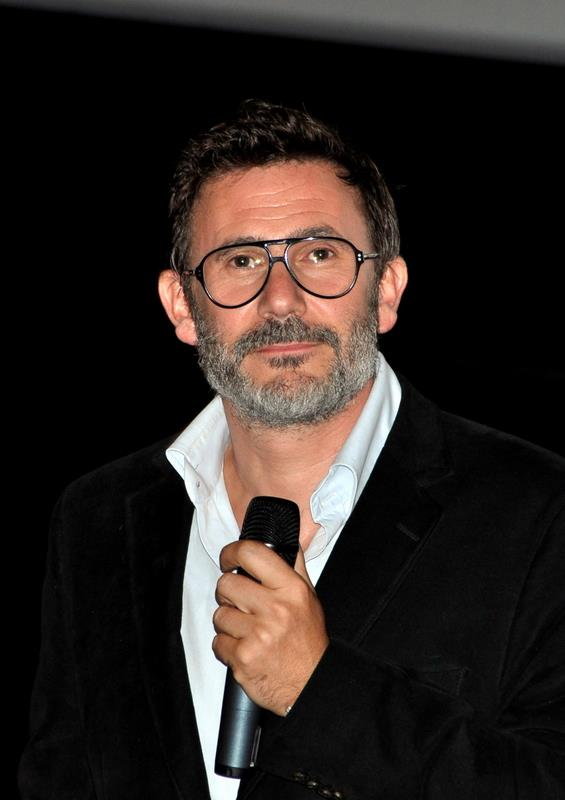 Michel Hazanavicius à l'avant-première de "The Artist"